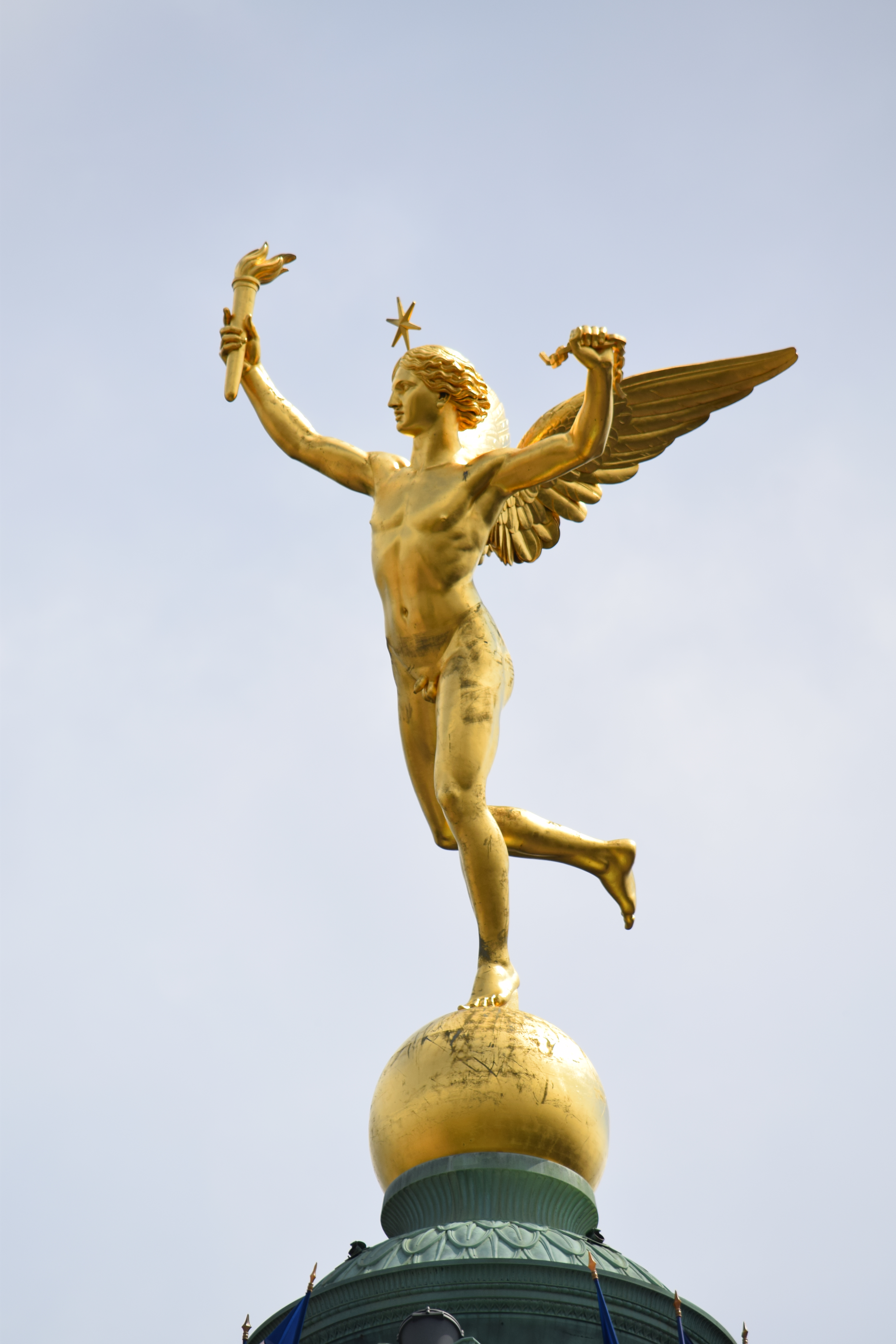 Ángel de la columna de la plaza de la Bastilla de París